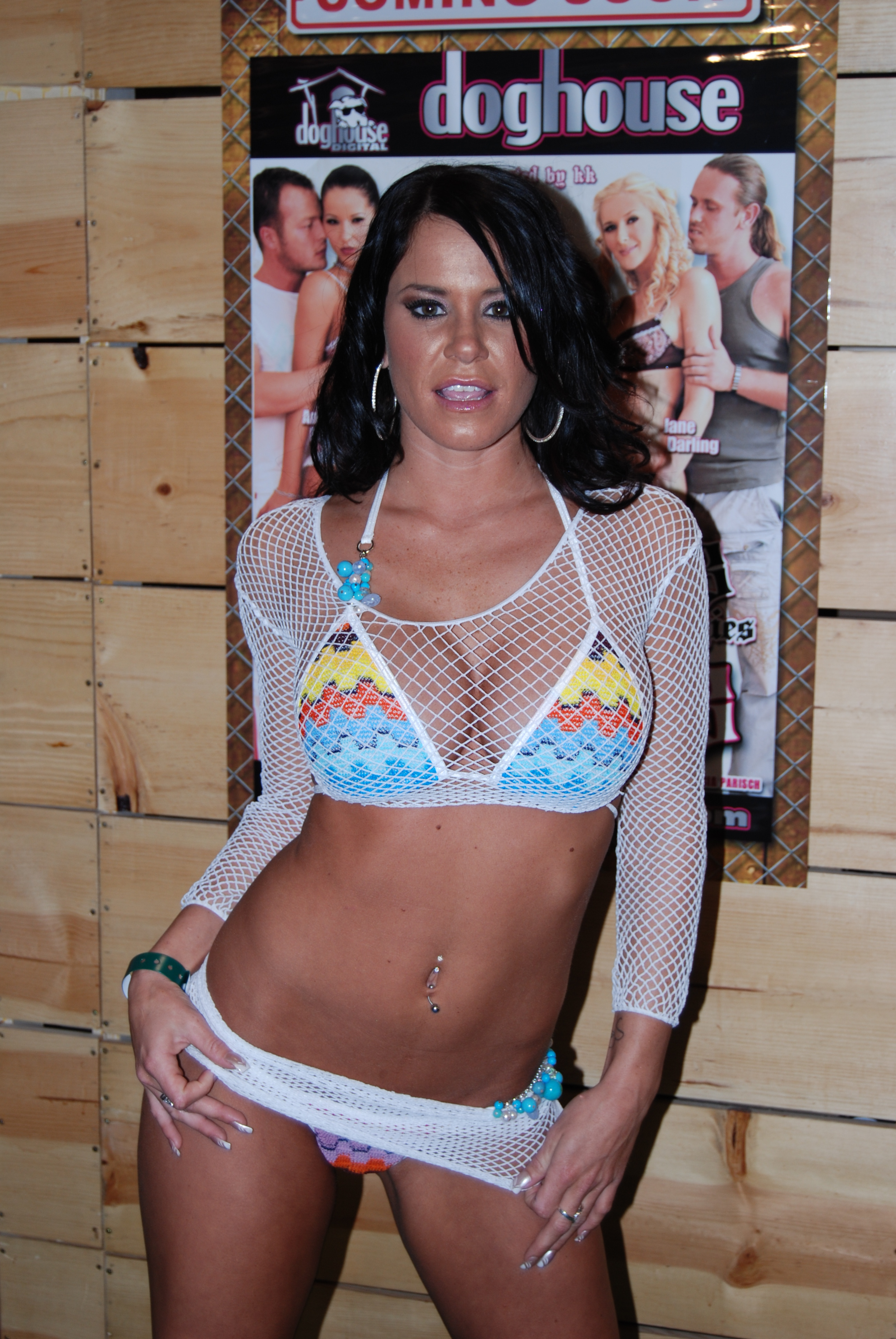 AEE2008_Nikon_Day2 173